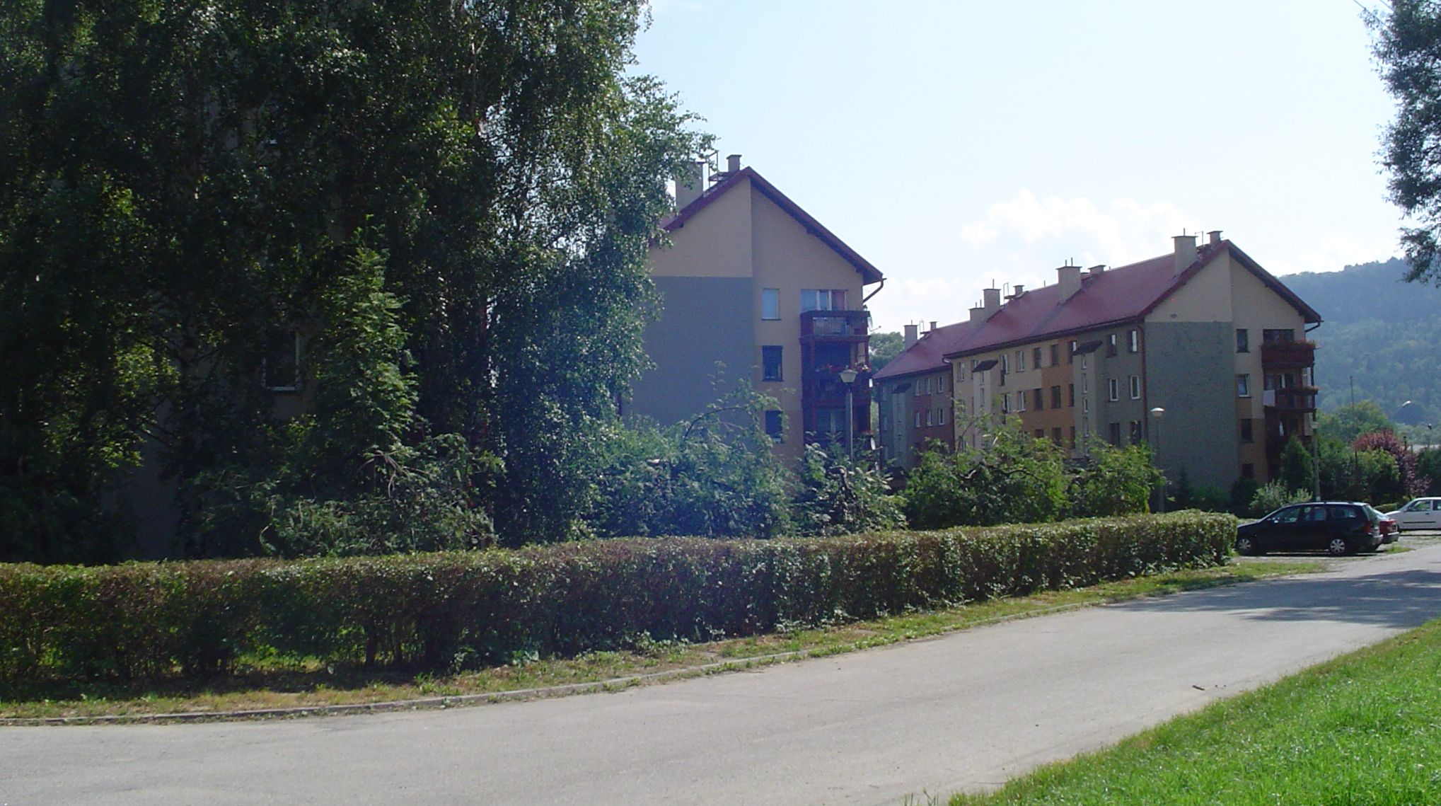 Osiedle Zgoda w Żywcu - część, w której stoją bloki mieszkalne